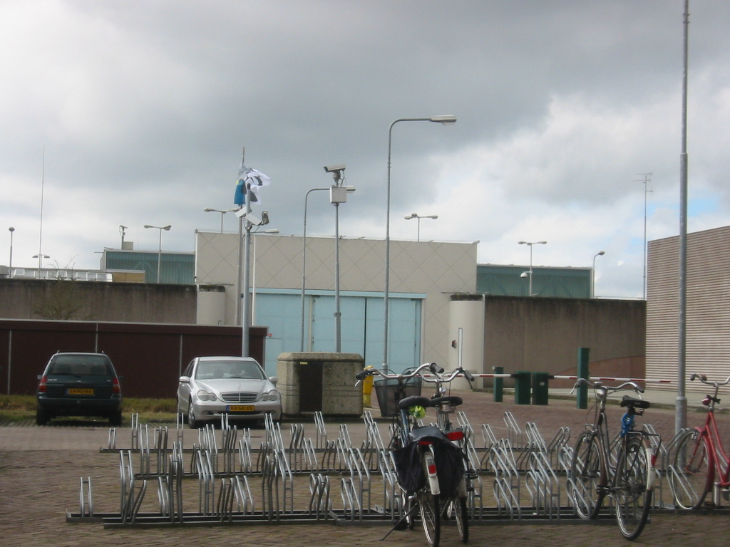 Gevangenis PI Nieuw-Vosseveld Vught, zelfgemaakt